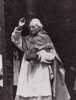 Ferdinand von Schlör 1838-1924, Bischof von Würzburg (1898-(1920)1924